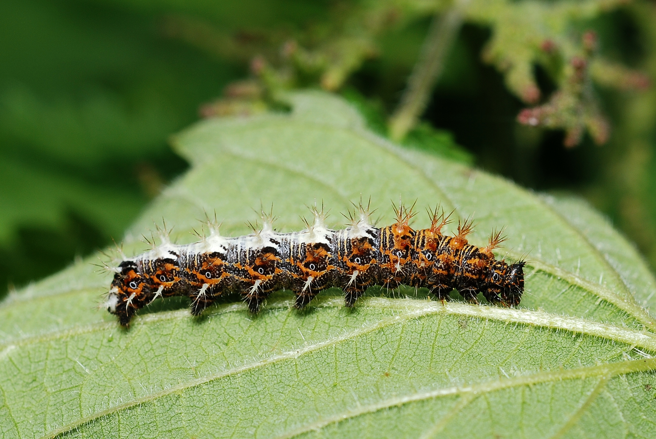 Polygonia c-album caterpillar